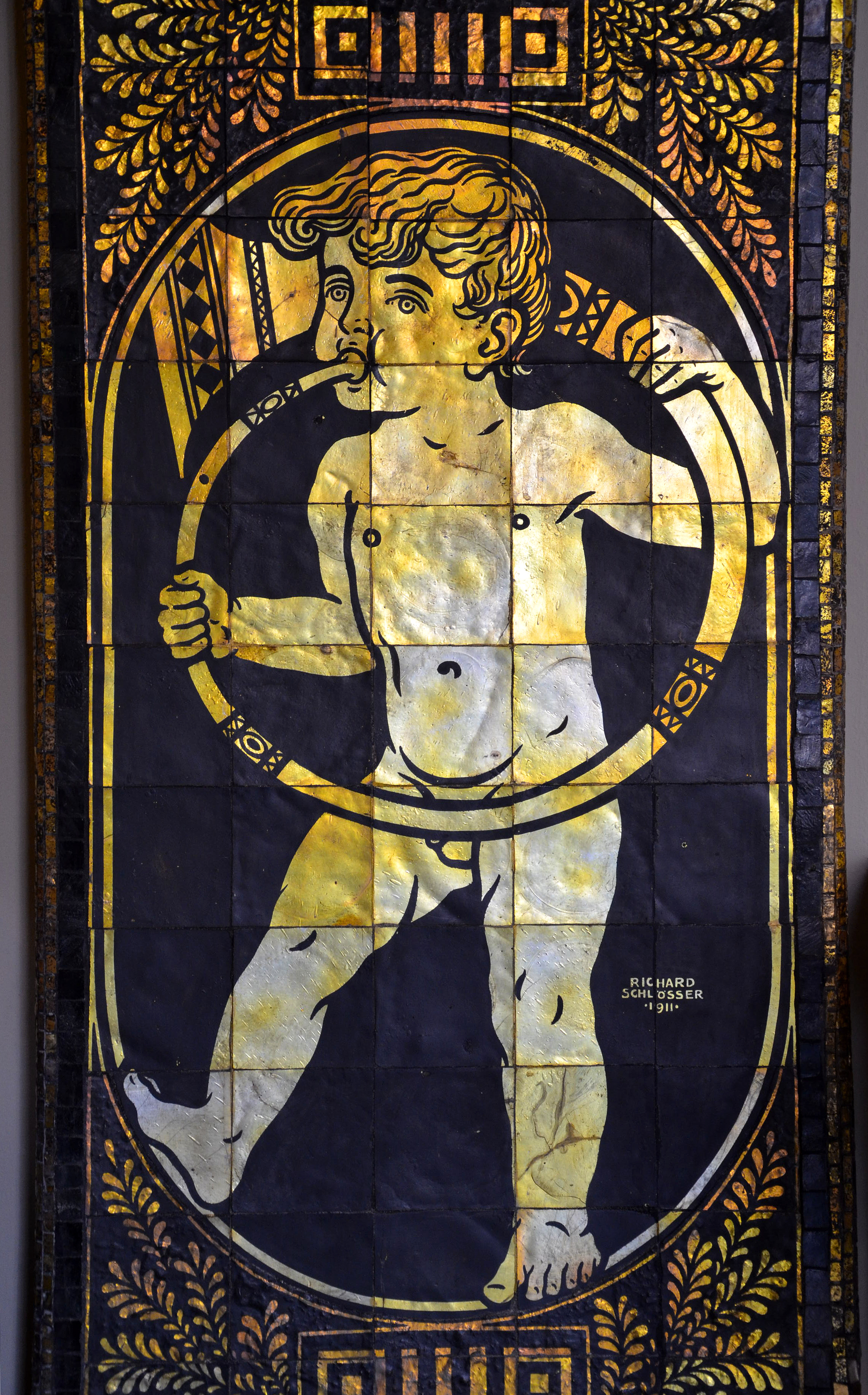 Detail aus einem der 1911 für das Neue Rathaus in Hannover von Richard Schlösser geschaffenen Goldmosaikbögen, hier ein nackter Knabe beim Musizieren mit einem Horn, im linken Bildfeld die Künstlersignatur mit dem Jahresdatum 1911 ...